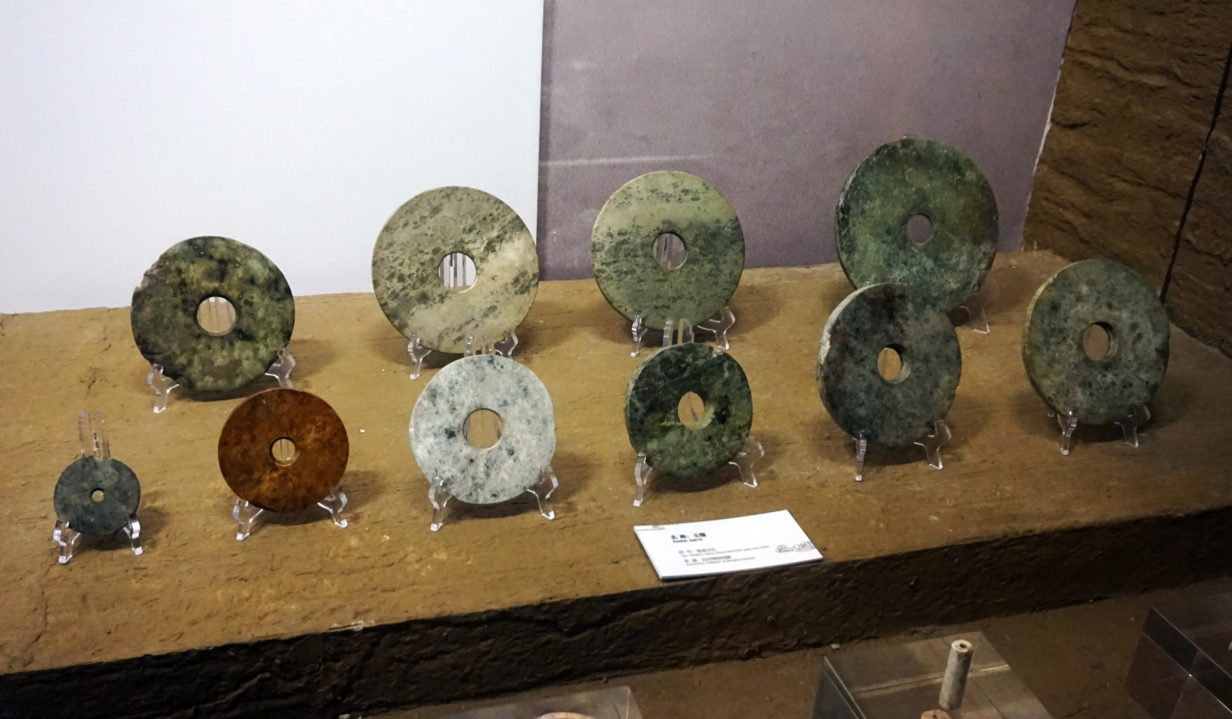 良渚玉壁。